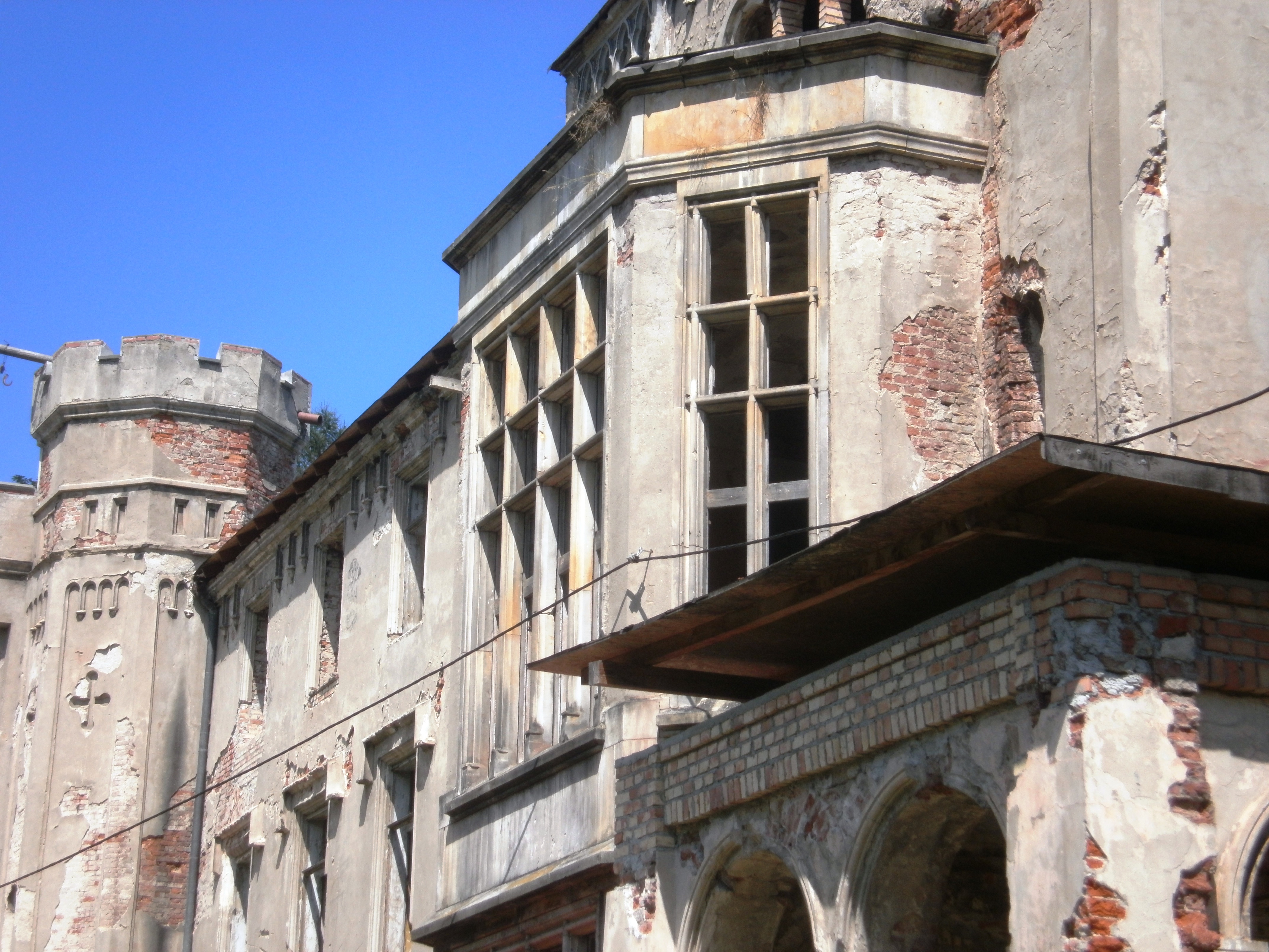 Zagórzany - pałac, XVIII, XIX